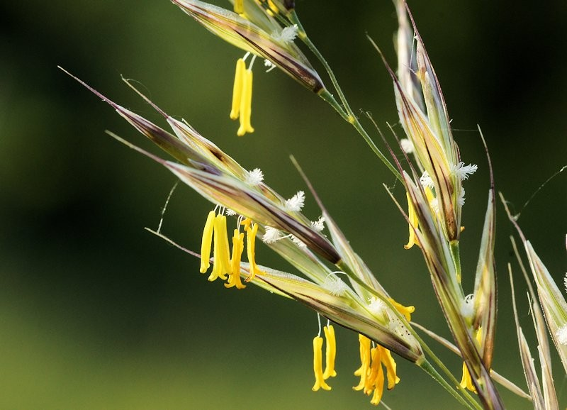 Bromopsis erecta flowers